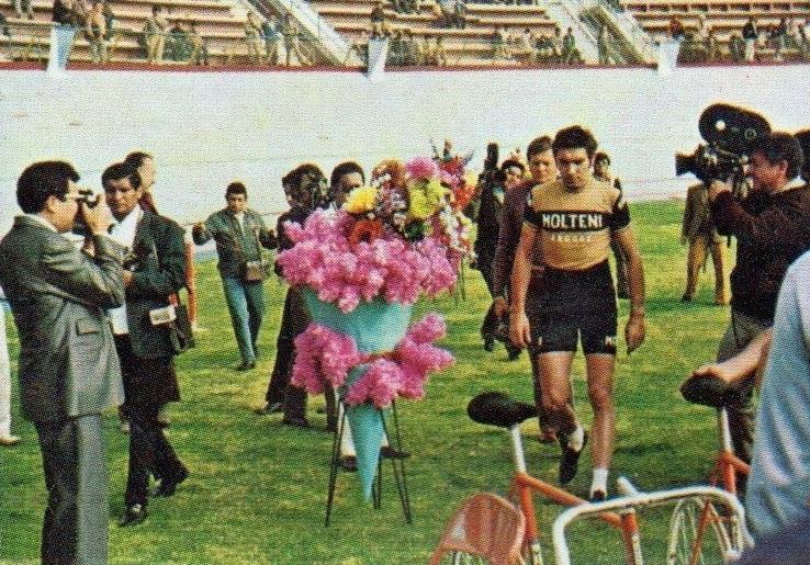 Eddy Merckx, arrivée du record du monde de l'heure à Mexico (1972),'Sprint 73', Panini figurina n°197.